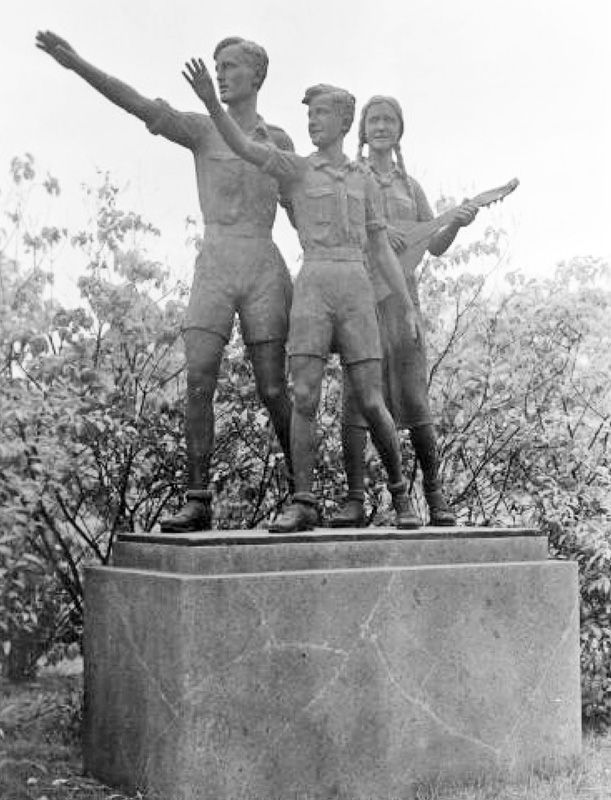 Das Jugend-Denkmal in Leipzig. (1938-1942 an der Reitzenhainer Ecke Naunhofer Straße)